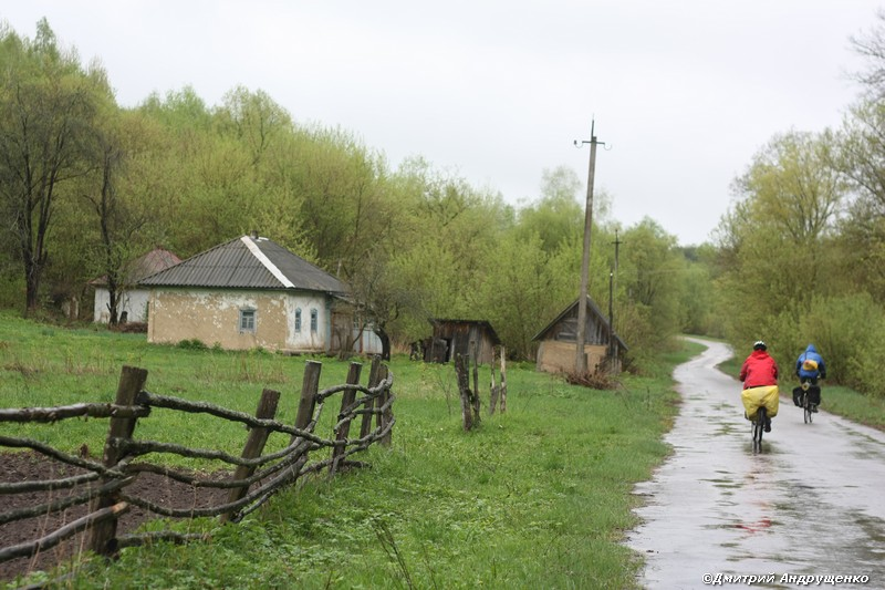 Мезинський